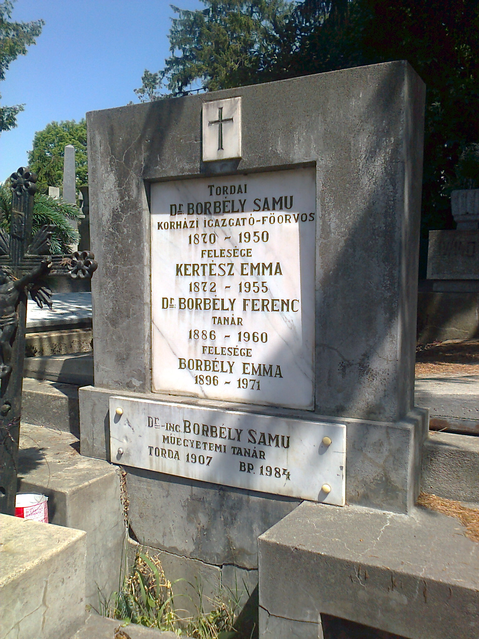 Borbély Samu (1907-1984) matematikus sírja (Marosvásárhely, katolikus temető)